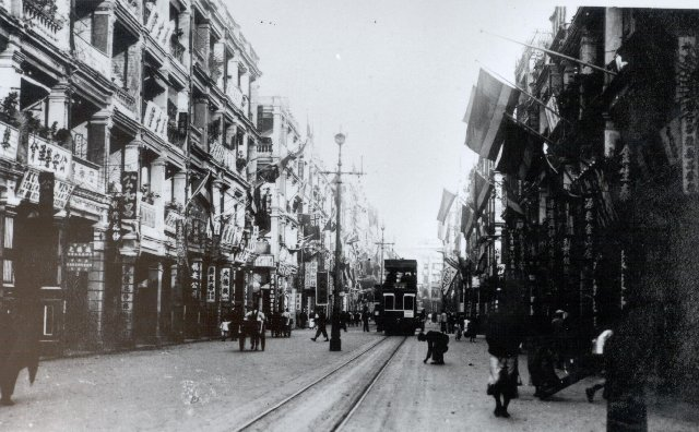 Des Voeux Road, Central